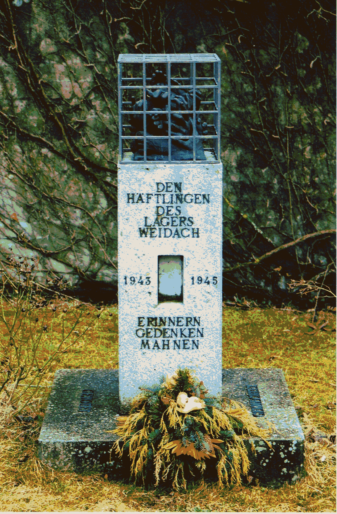 Denkmal der Pfarrei Weidach für das Außenlager Kottern-Weidach des Konzentrationslager Dachau